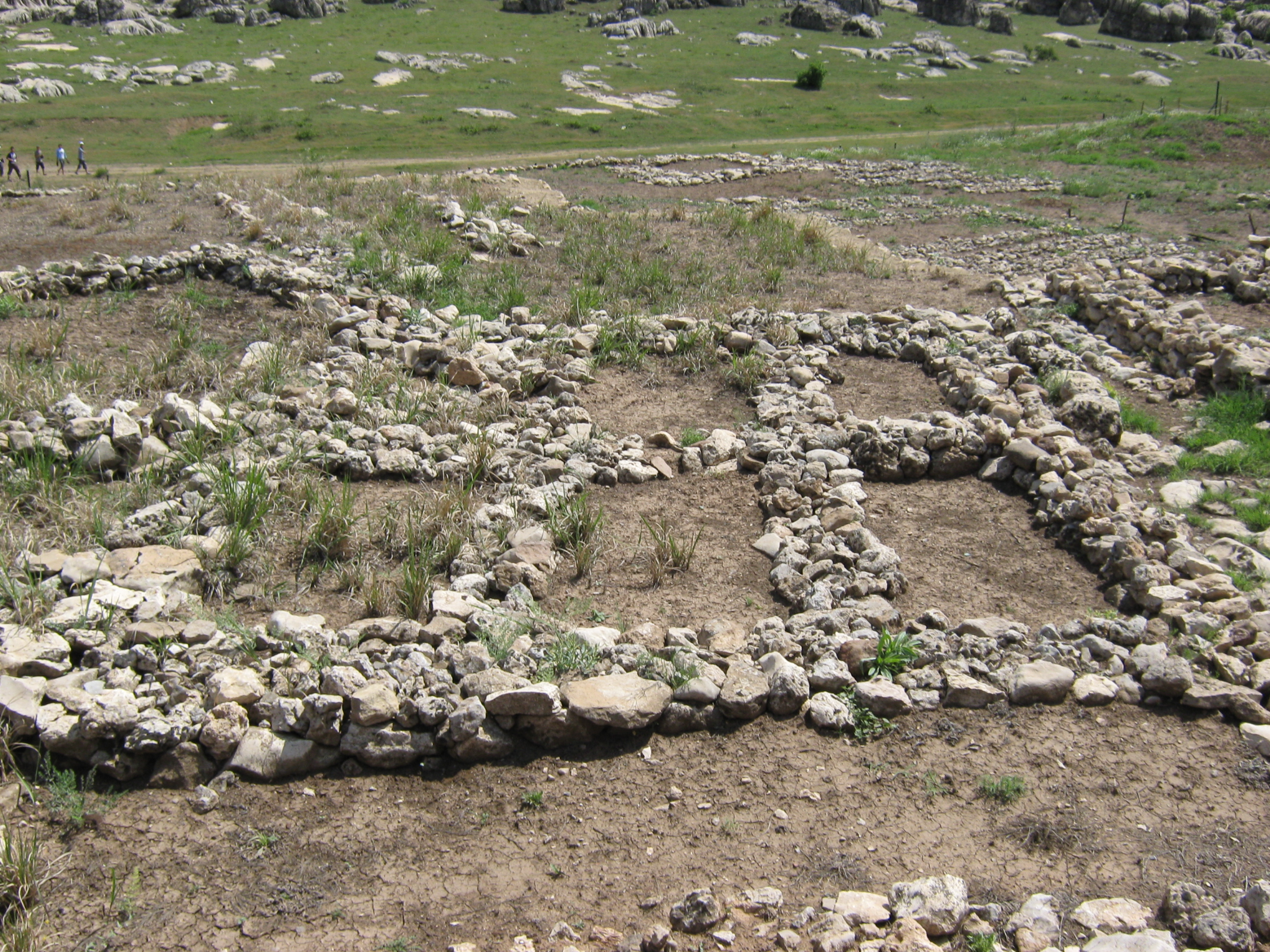 Ein Zellplan-Gebäude in Cayönü